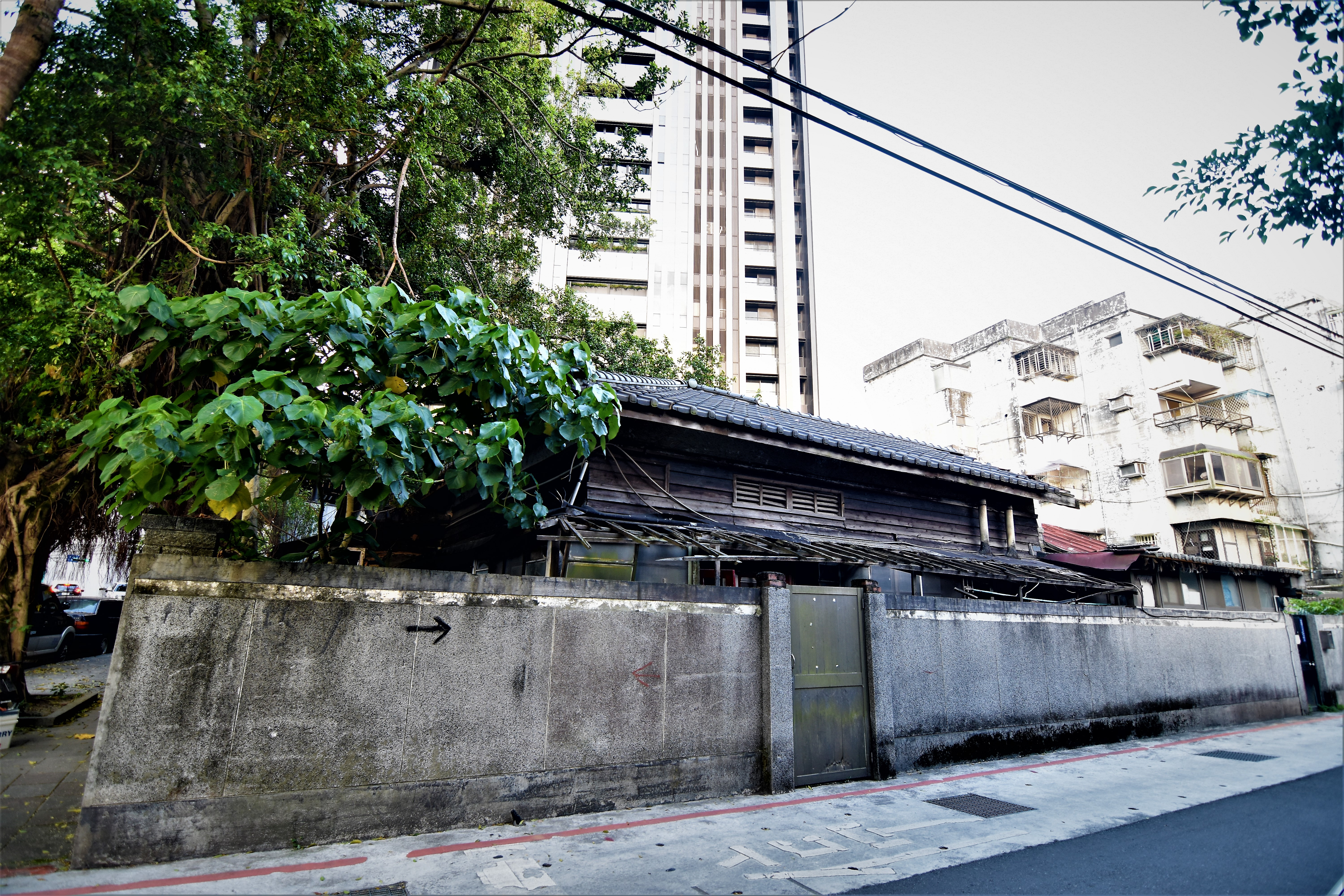 中文（台灣）: 松山療養所宿舍1